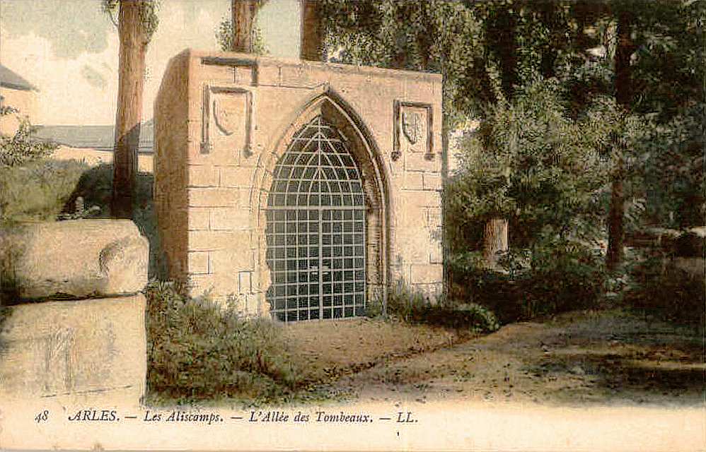 Tombeau des Porcellets aux Alyscamps